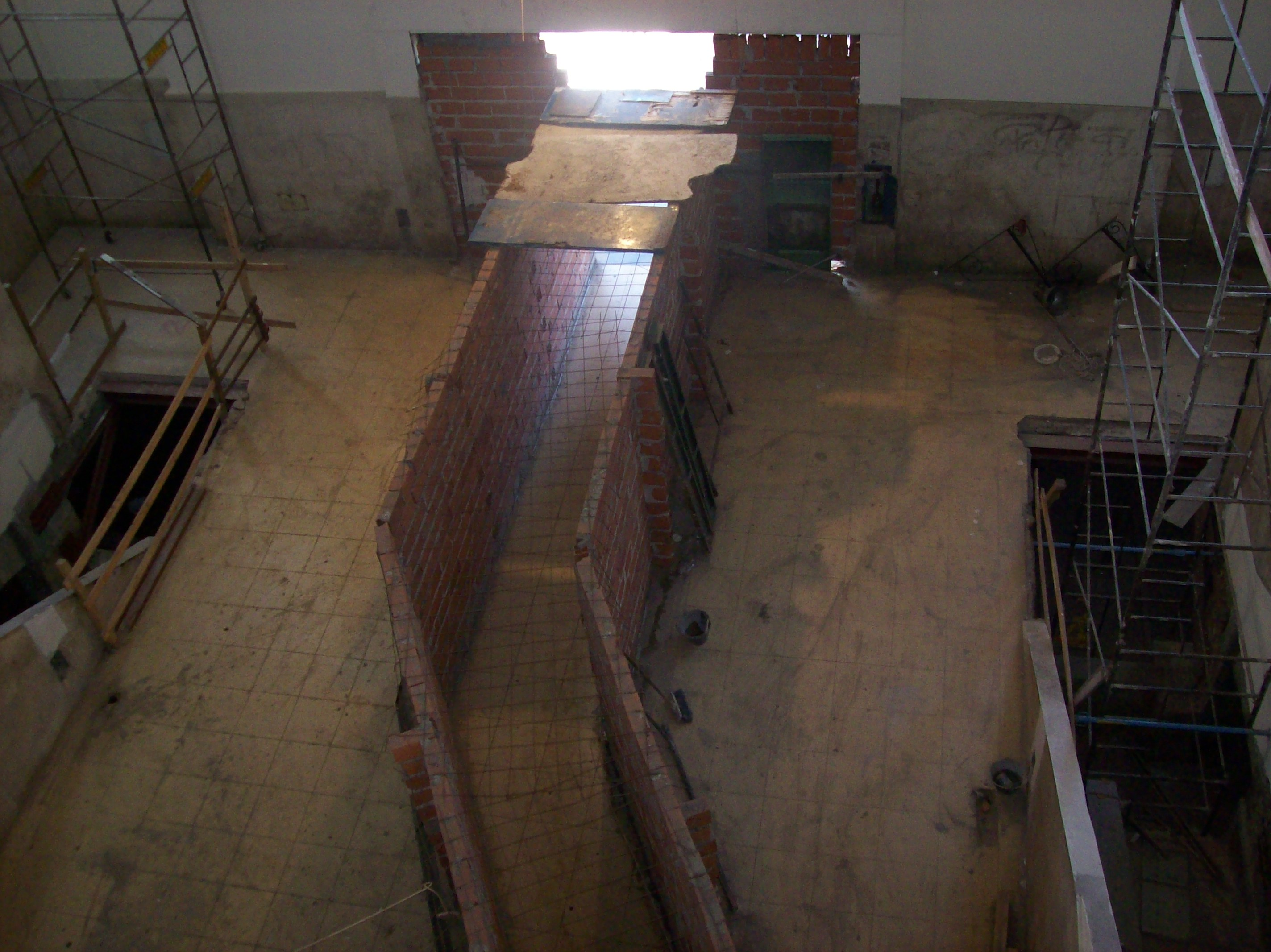 Obras de reparación del Puente Nicolás Avellaneda que cruza el Riachuelo, entre la Ciudad de Buenos Aires y la provincia del mismo nombre en Argentina.